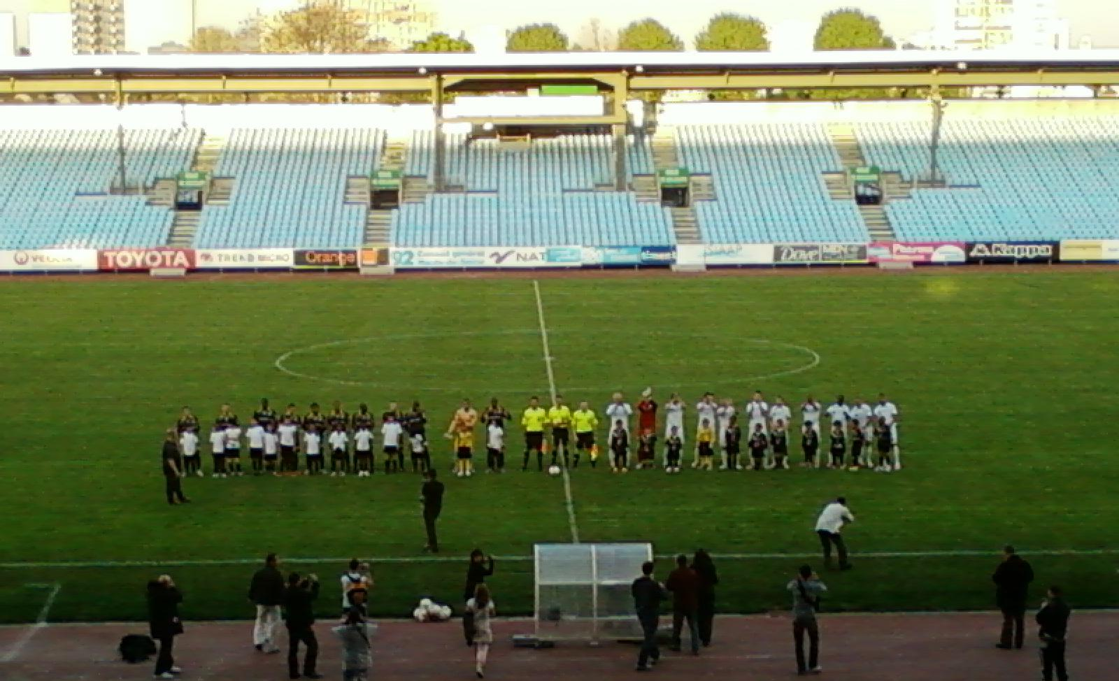 Présentation des équipes lors du match UJA Alfortville-RC Strasbourg du 9 avril 2011